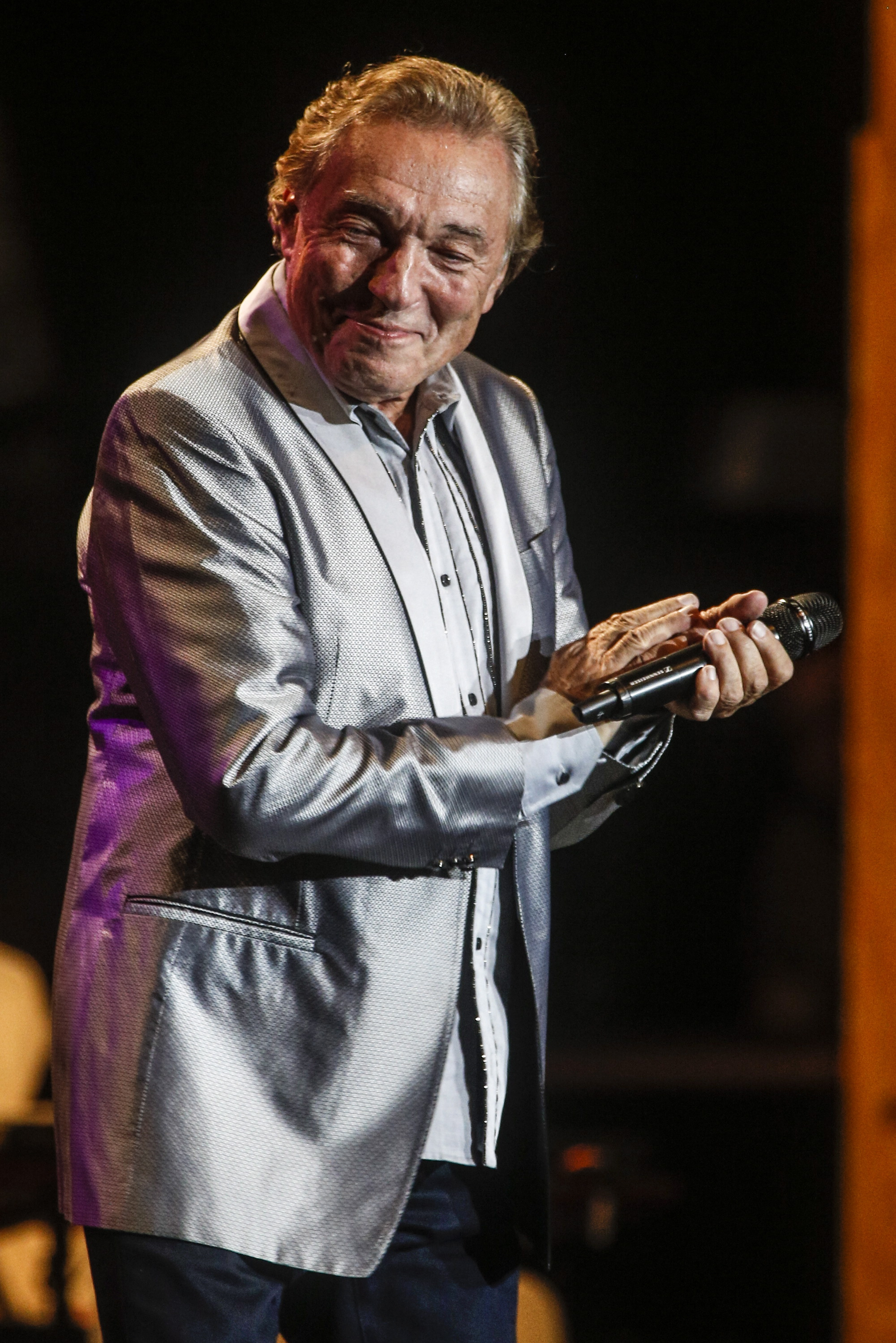 Karel Gott bei einem Auftritt in der Jahrhunderthalle Frankfurt am Main am 18. Oktober 2013 während der Musikanenstadl-Tournee.